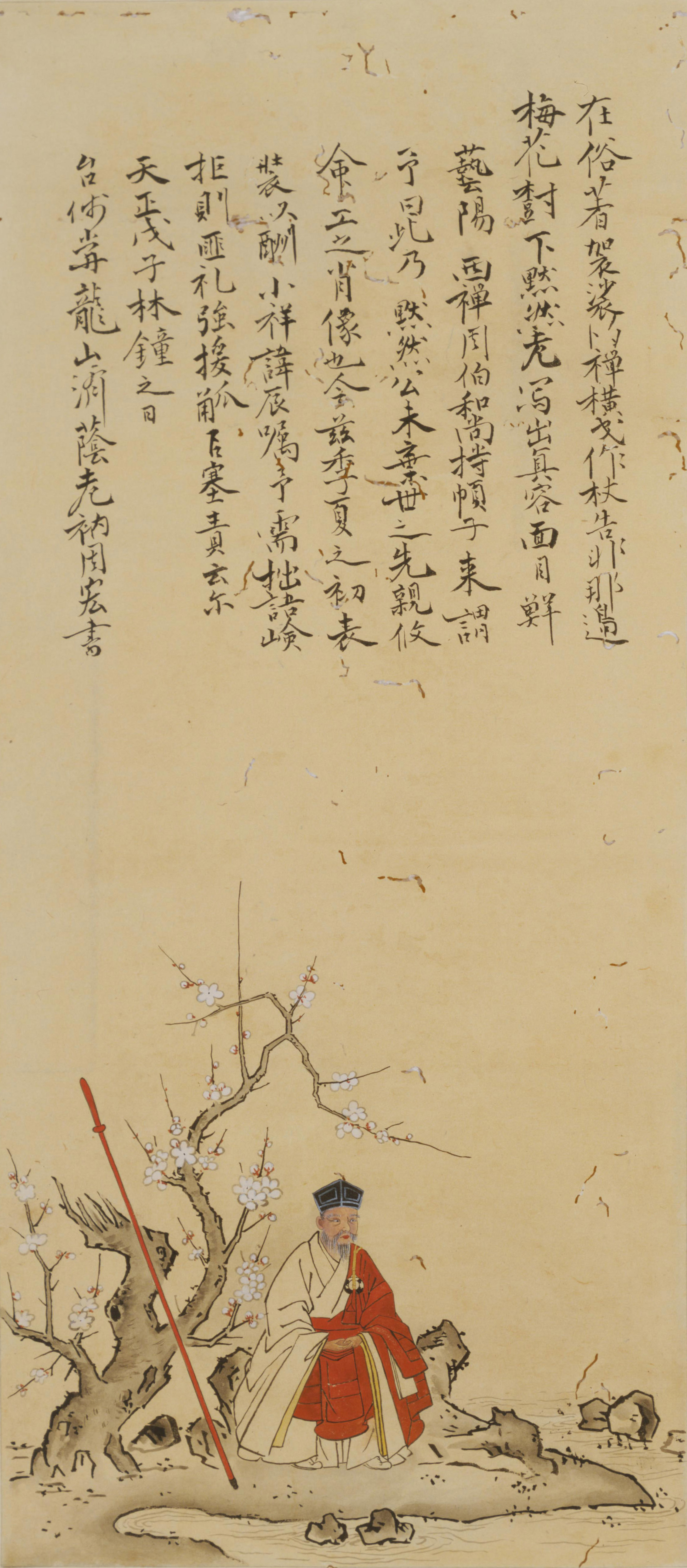 吉川元長の肖像。